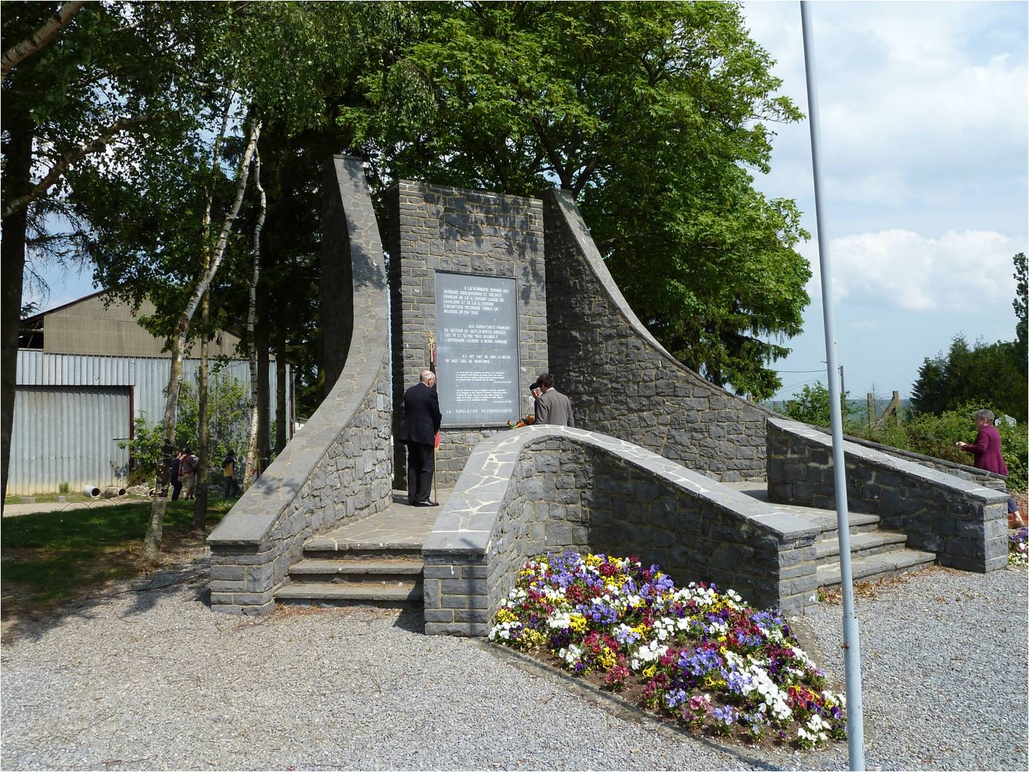 Monument butte 122